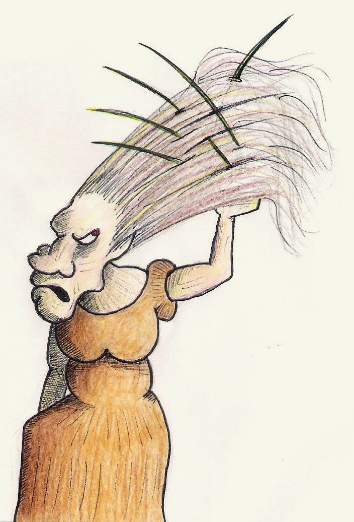 Pettenedda - creatura leggendaria sarda. Matite colorate e penna su carta